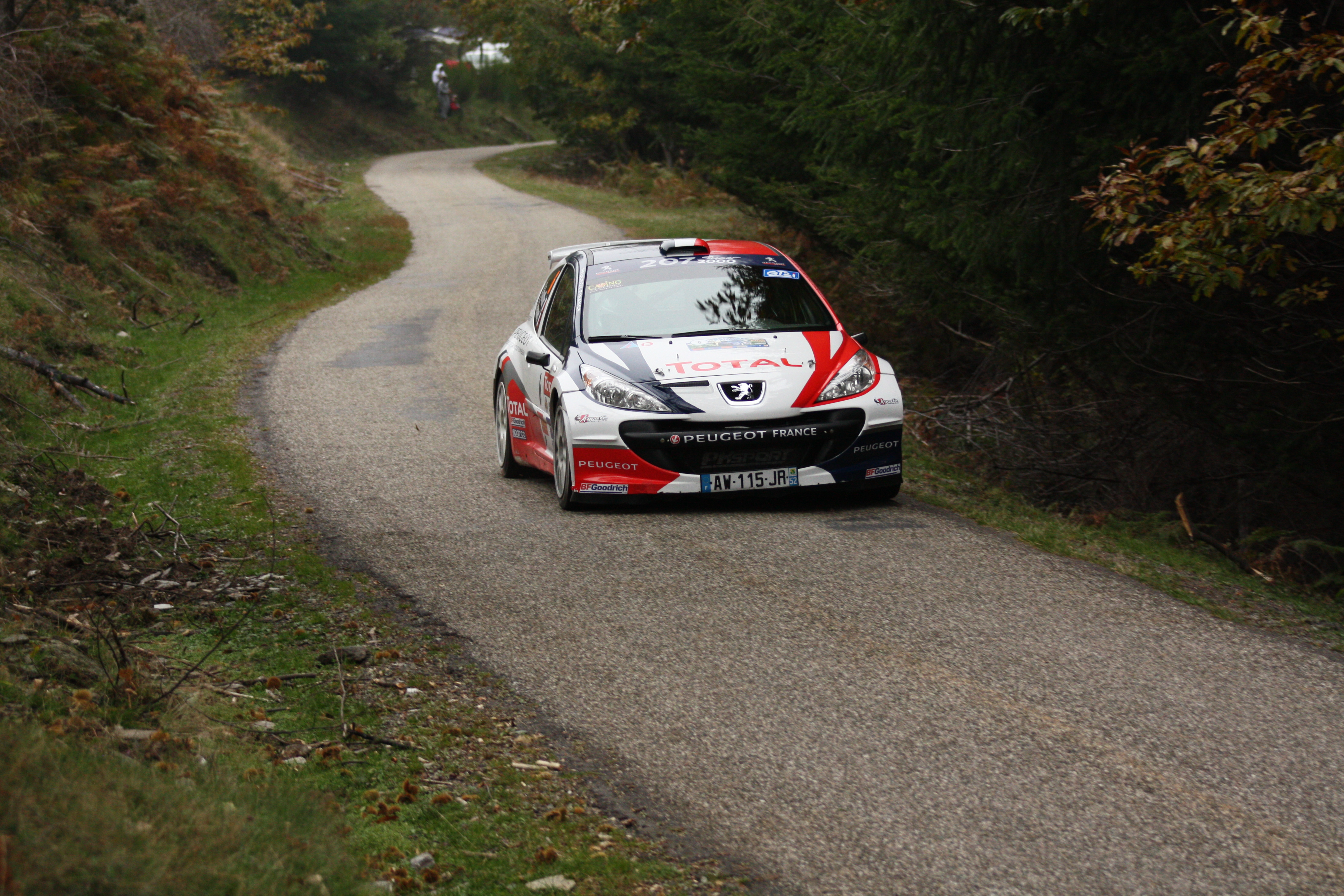 Bryan Bouffier Lors du Critérium des Cévennes